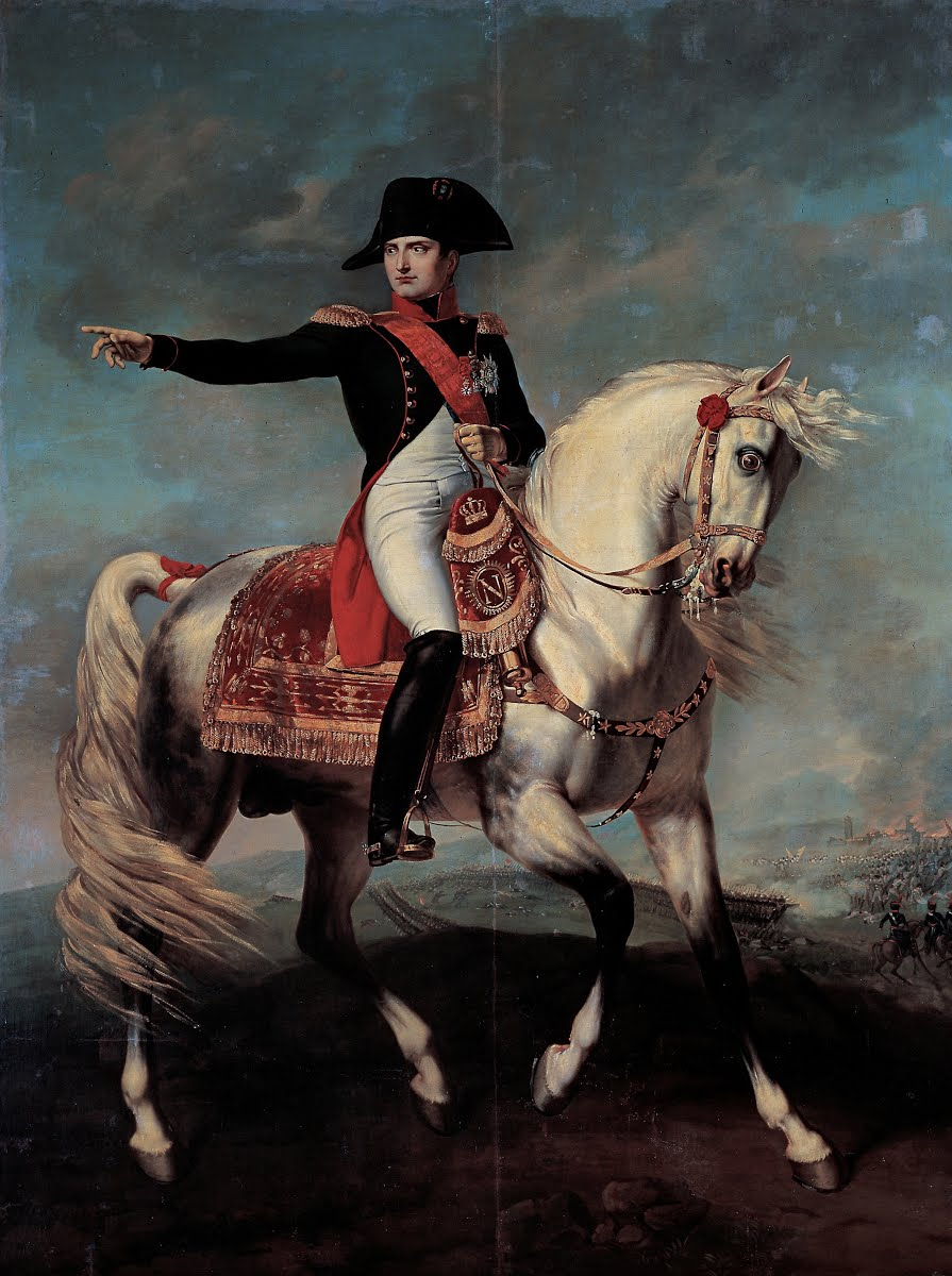 Joseph Chabord, Napoléon sur le champ de bataille de Wagram 1810 museo Napoleonico Rome